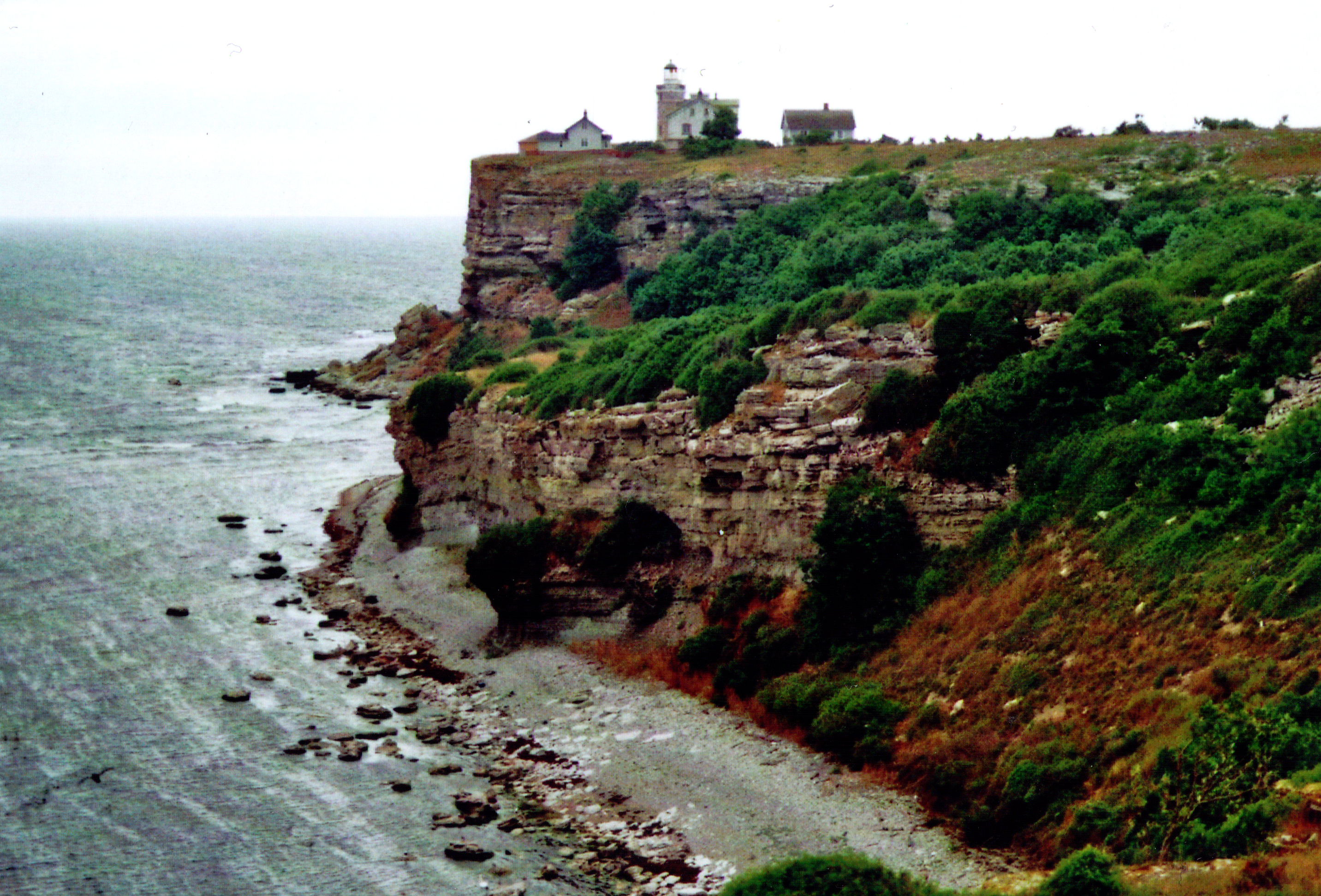 Stora Karlsö bei Gotland